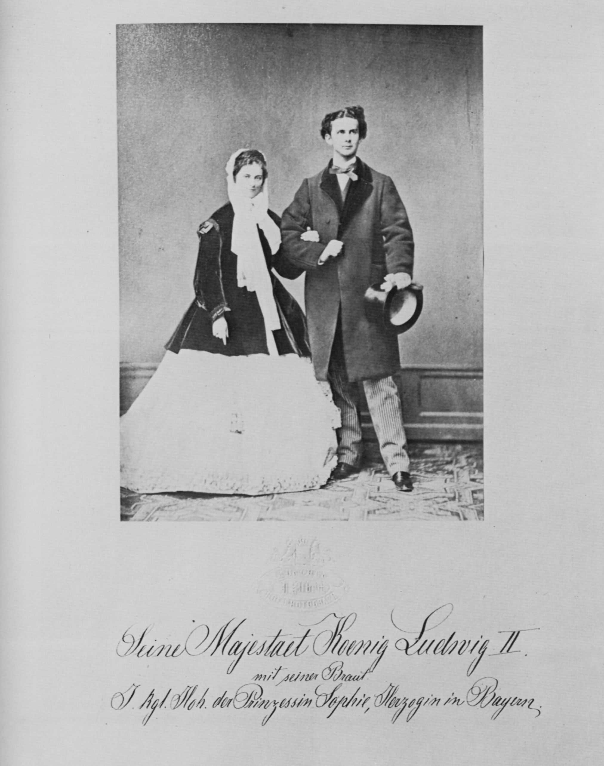 Joseph Albert: Offizielles Verlobungsphoto König Ludwigs II. mit Prinzessin Sophie von Bayern (Original).